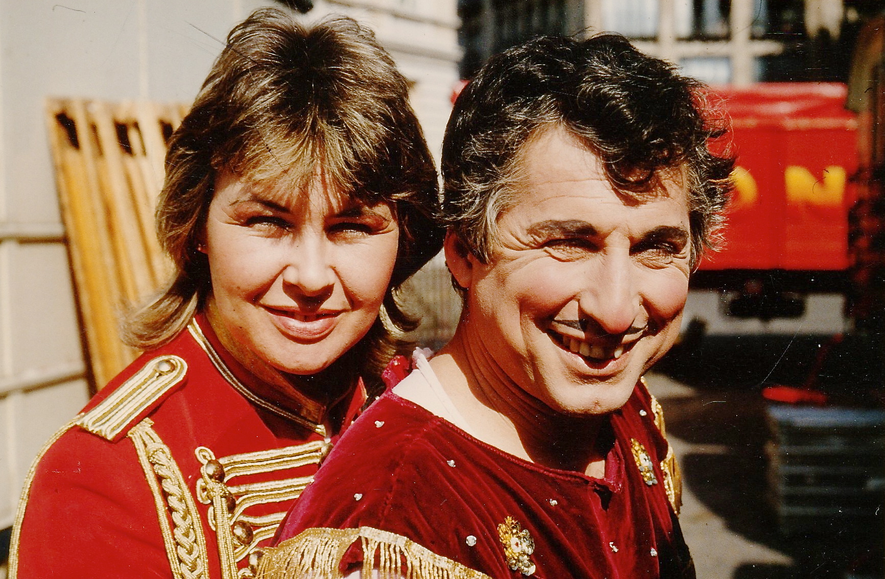 au Circus Roncalli